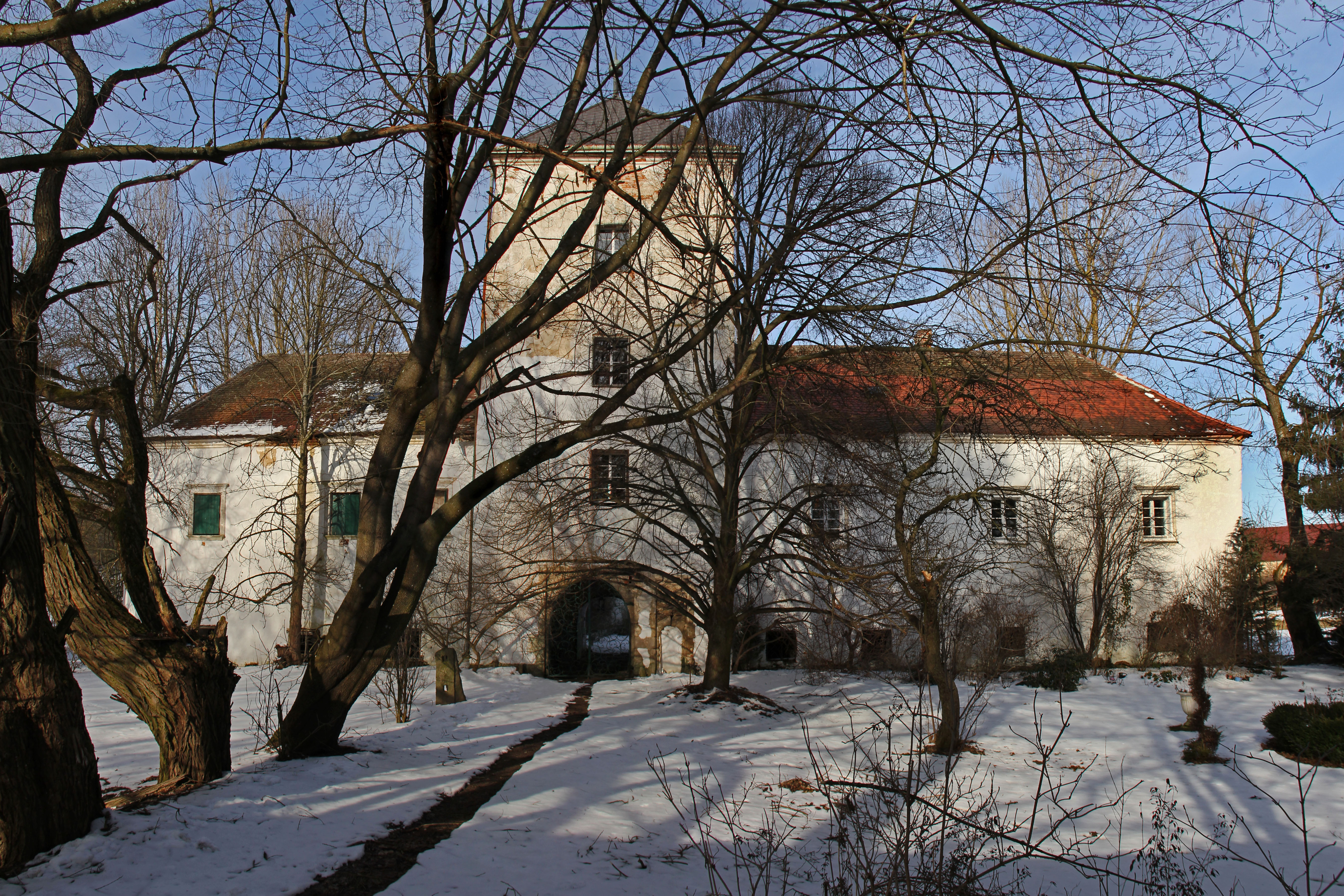 Das im Osten der angerartigen Ausweitung in Illmau gelegene Schloss ist ein dreiflügeliges Renaissanceschloss mit mächtigem Torturm. Der Bau wurde für Zacharias Wochenitzki errichtet. Er ist bezeichnet mit 1551, urkundlich erwähnt wurde er bereits 1547.